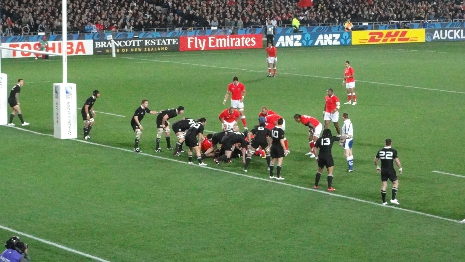 Match Nouvelle-Zélande contre Tonga en match d'ouverture de la Coupe du monde 2011